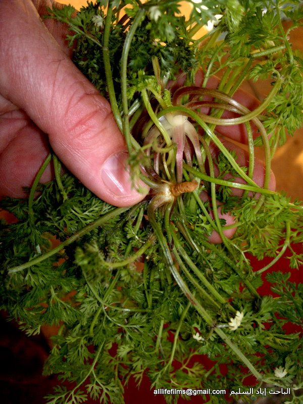 الحرتمنة